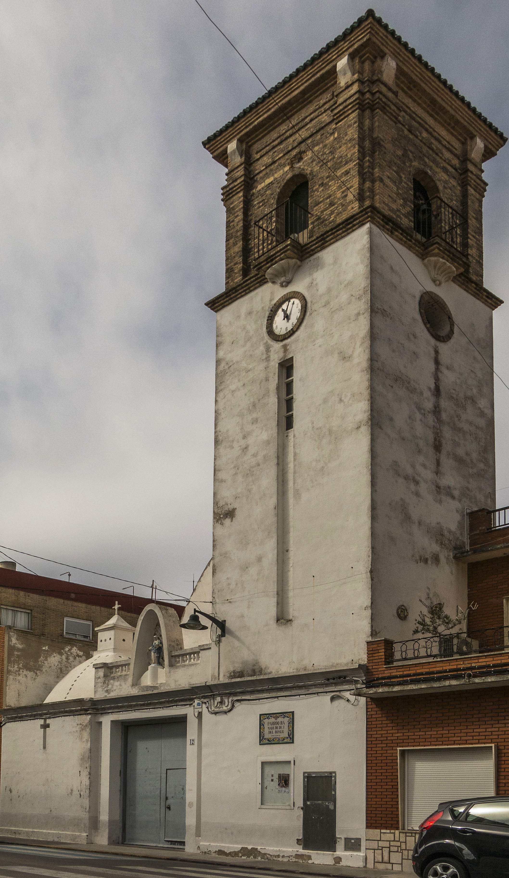 Mareny de Barraquetes és una localitat del País Valencià, antiga pedania del municipi de Sueca i des del 12 de desembre de 1999, definida com a entitat d'àmbit territorial inferior al municipi, EATIM. Es troba enclavat en el Parc Natural de l'Albufera de València i al costat de la mar (Viquipèdia)